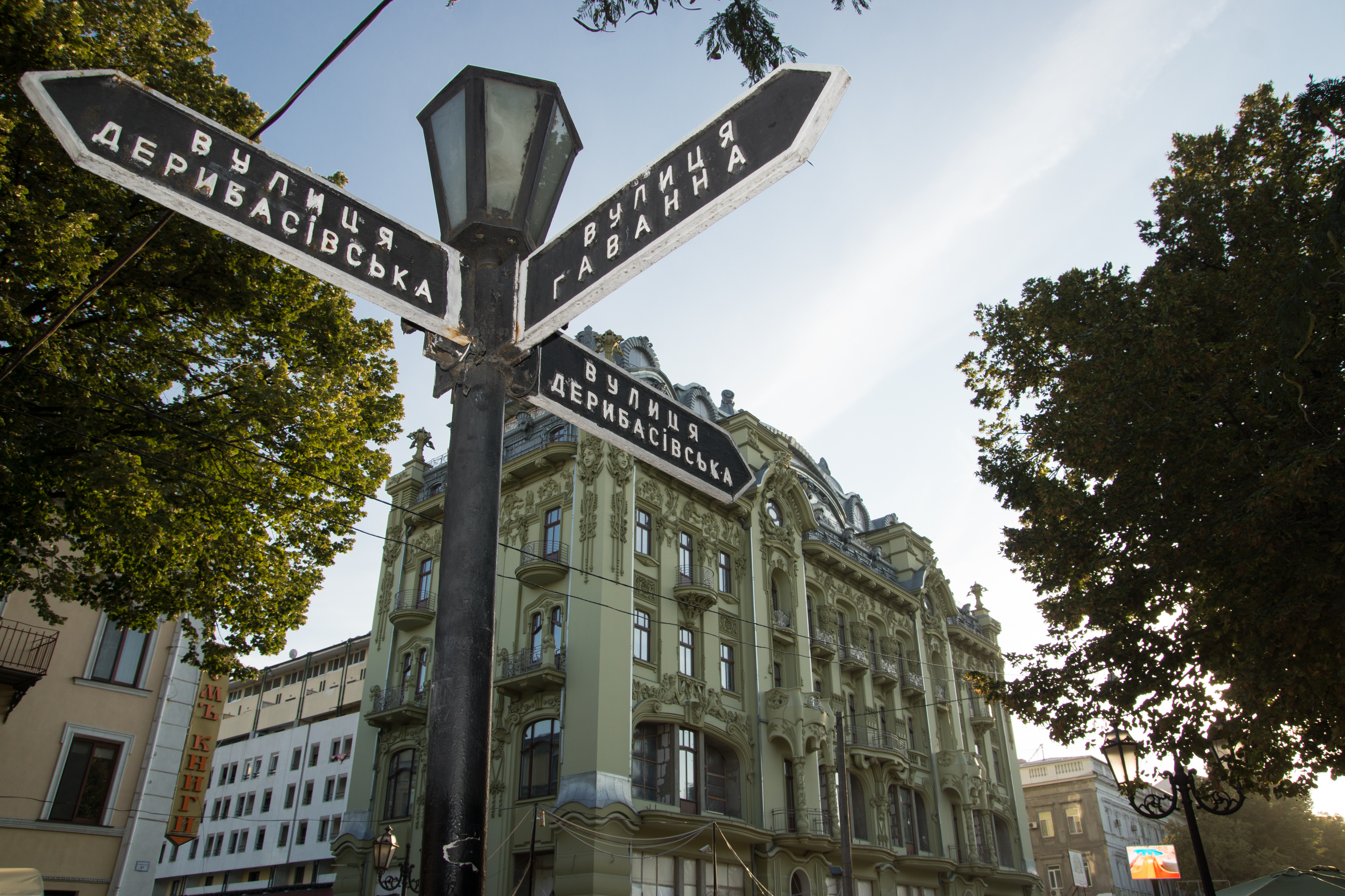 Будівля готелю “Великий Московський, в якому жили:- Л.М. Гаккебуш - народна артистка УРСР; - Вілен Зітек - чеський оперний співак; - Н.М. Ужвій - актриса, народна артистка СРСР; - Г.В. Жуков - командуючий Одеським оборонним районом